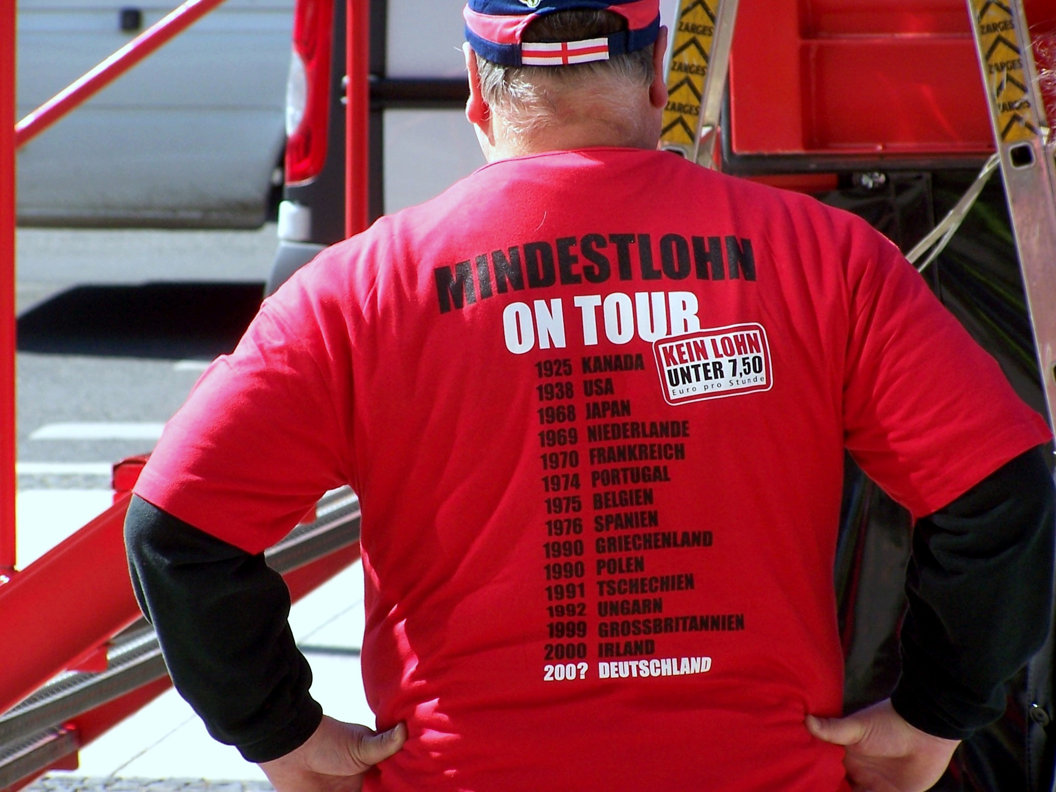 Mindestlohn on tour (Berlin, 2007)